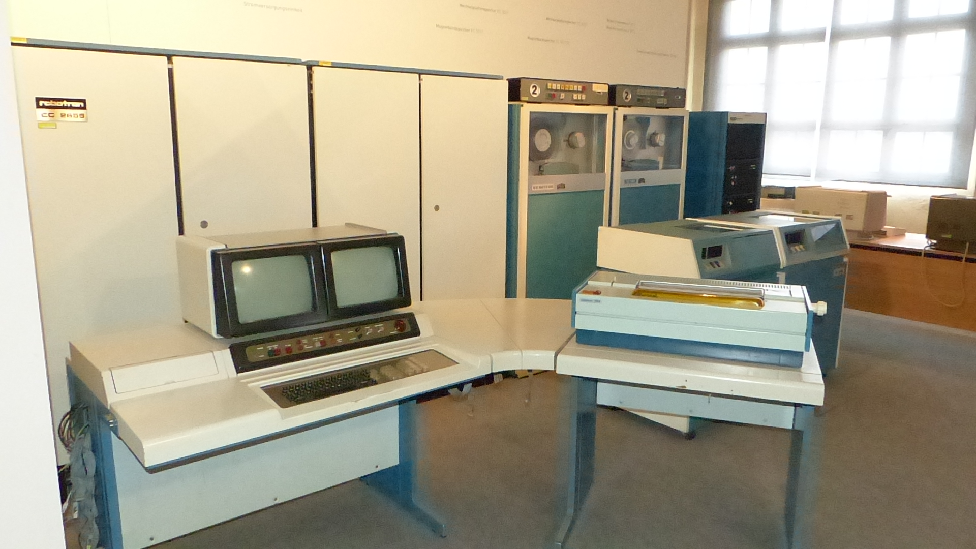 Robotron Computer ESER EC 1055, Exponat in den Technischen Sammlungen Dresden